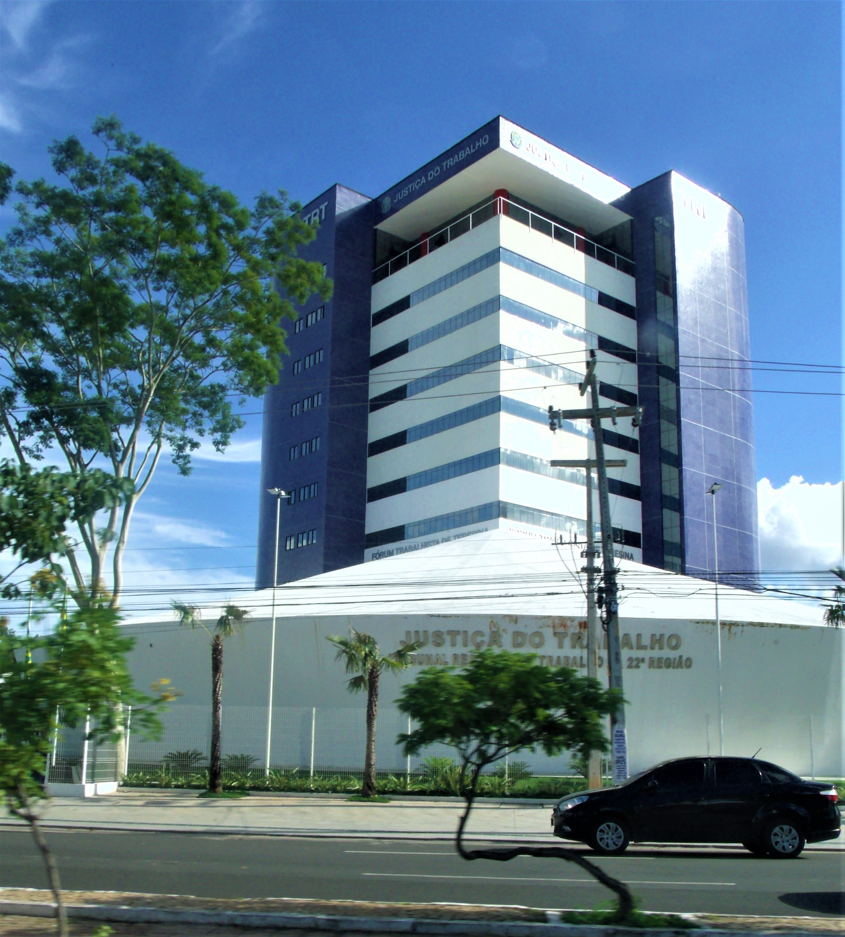 Novo edifício do Tribunal Regional do Trabalho da 2ª Região em Teresina.